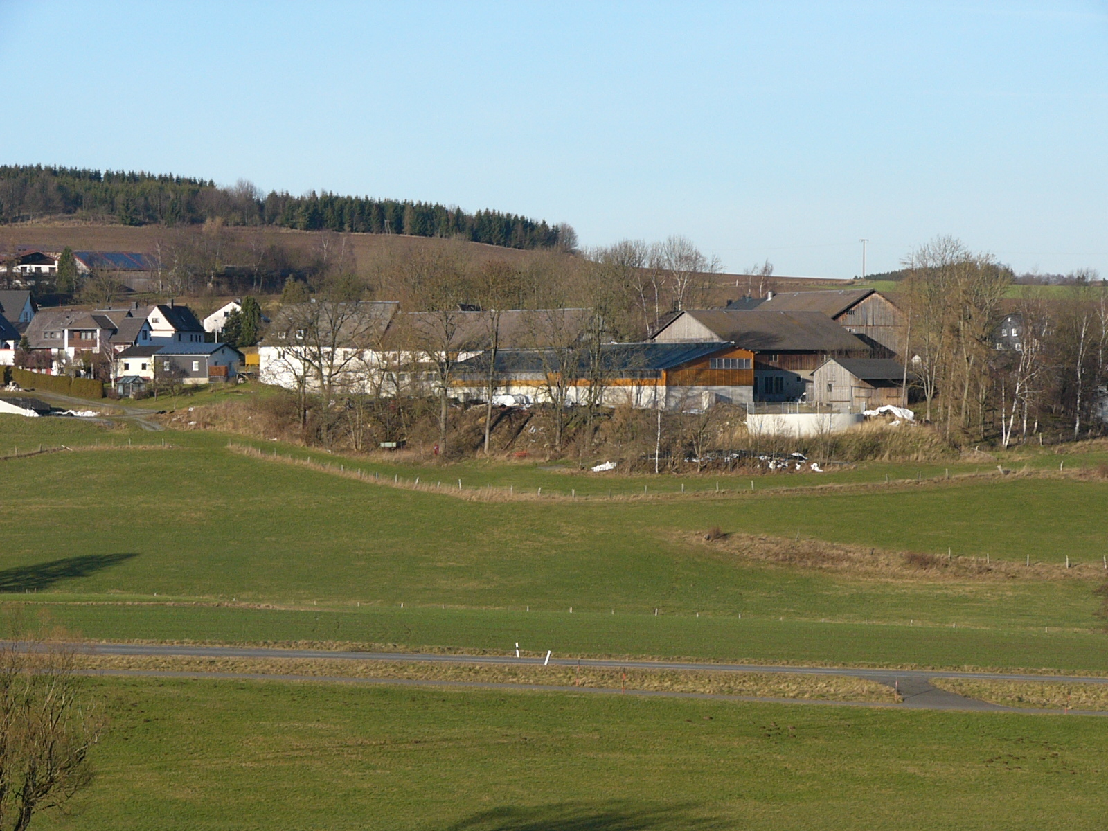 Ansicht der Schlossruine Thierbach